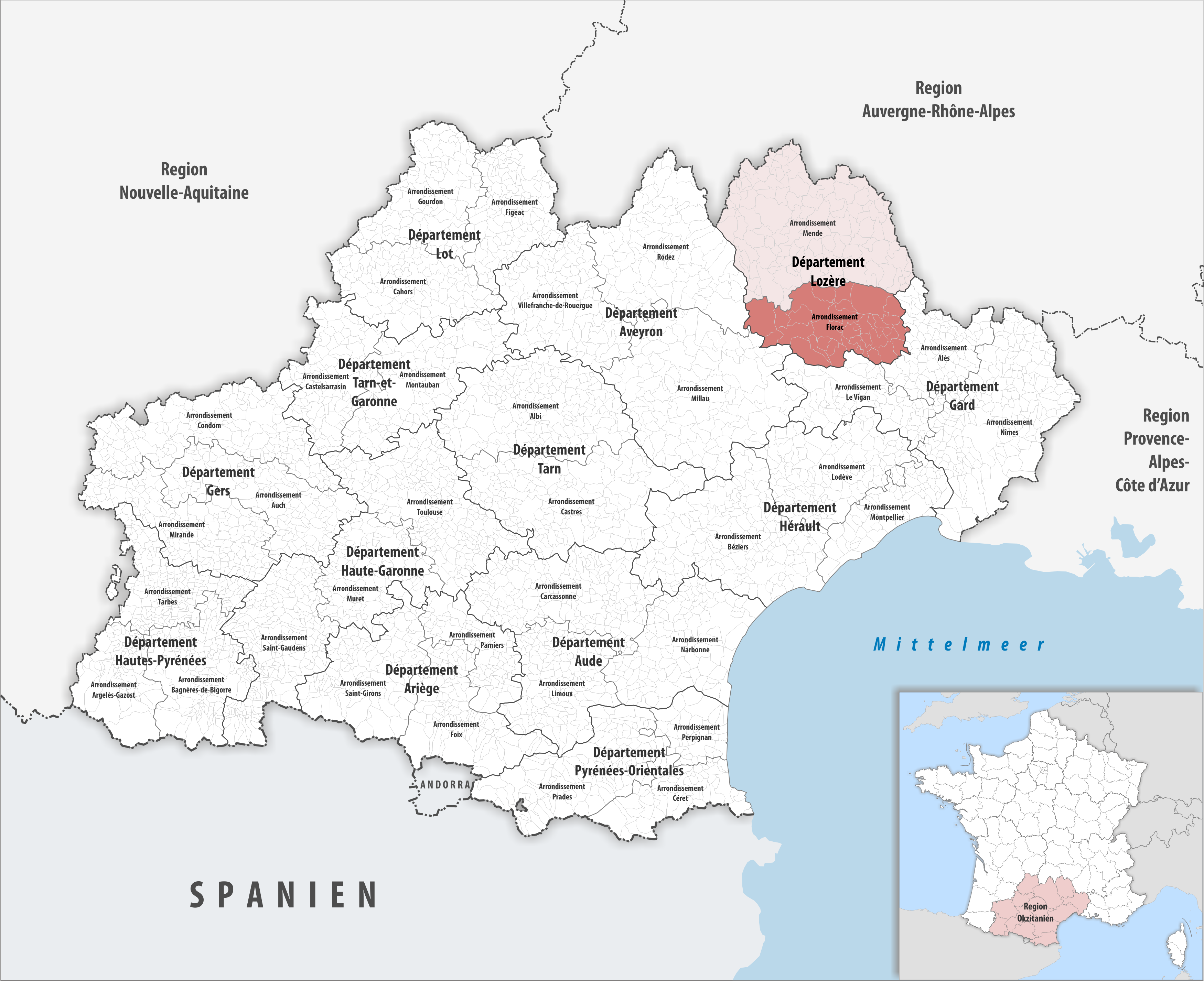 Lage des Arrondissements Florac